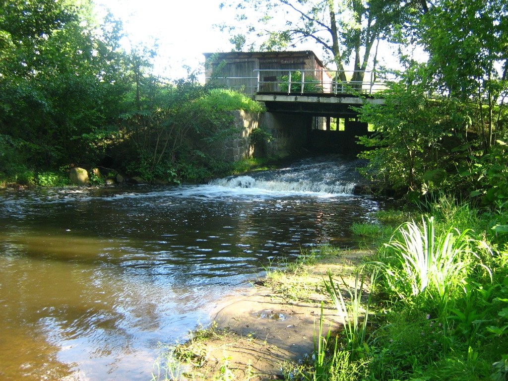 der Augraben, ein Nebenfluss der Tollense, bei Leistenow (ehm. Mühlenstau)